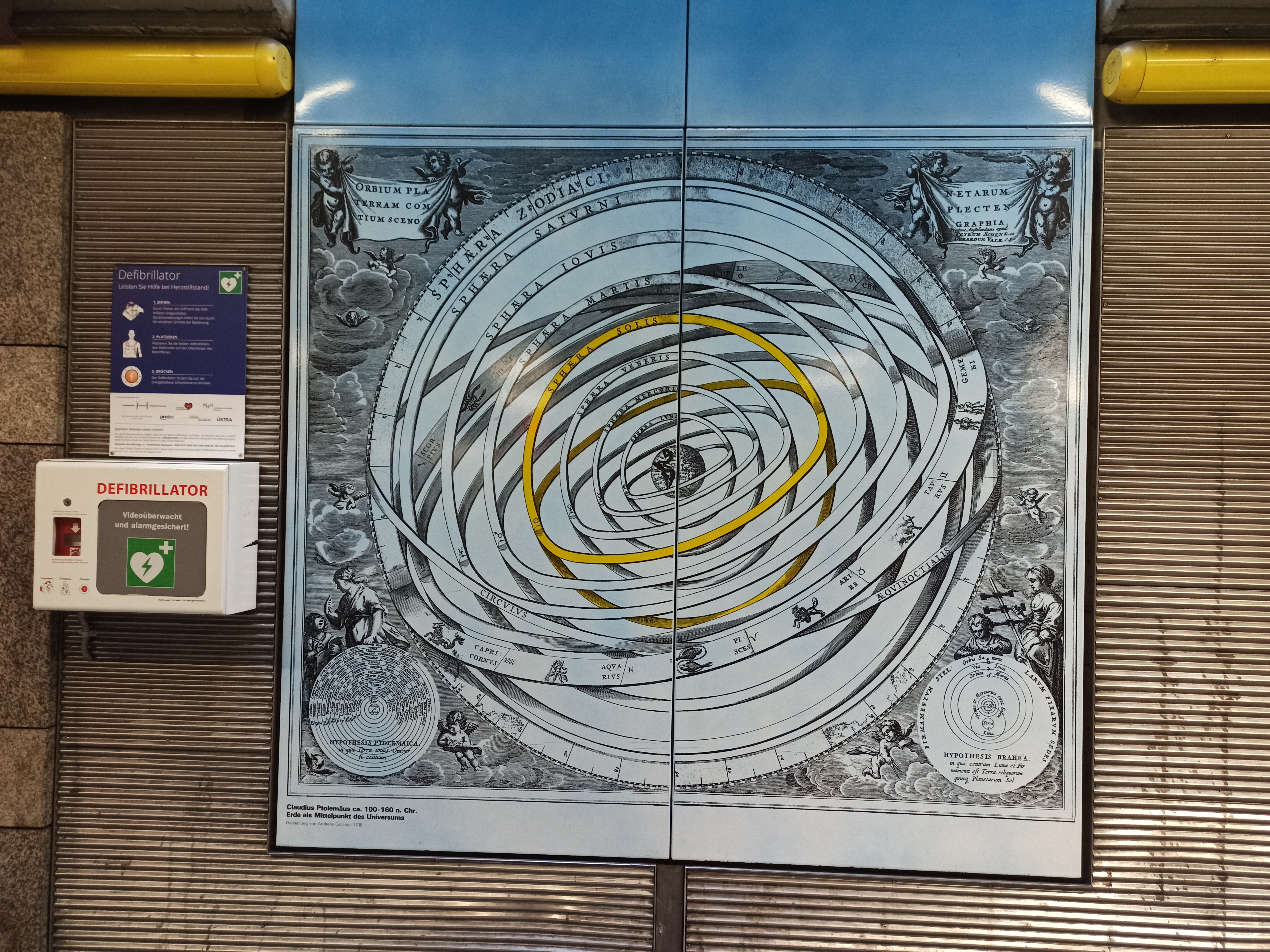 Stadtbahn Hannover, U-Bahnhof Kopernikusstraße, Grafik des geozentrischen Weltbildes nach Claudius Ptolemäus (ca. 100-160 n.Chr.) aus dem historischen Sternatlas Harmonia Macrocosmica, Taken on 28 June 2020